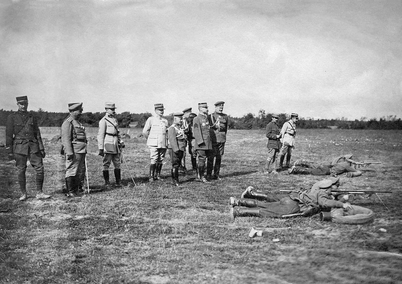 Mission française auprès de l'armée russe